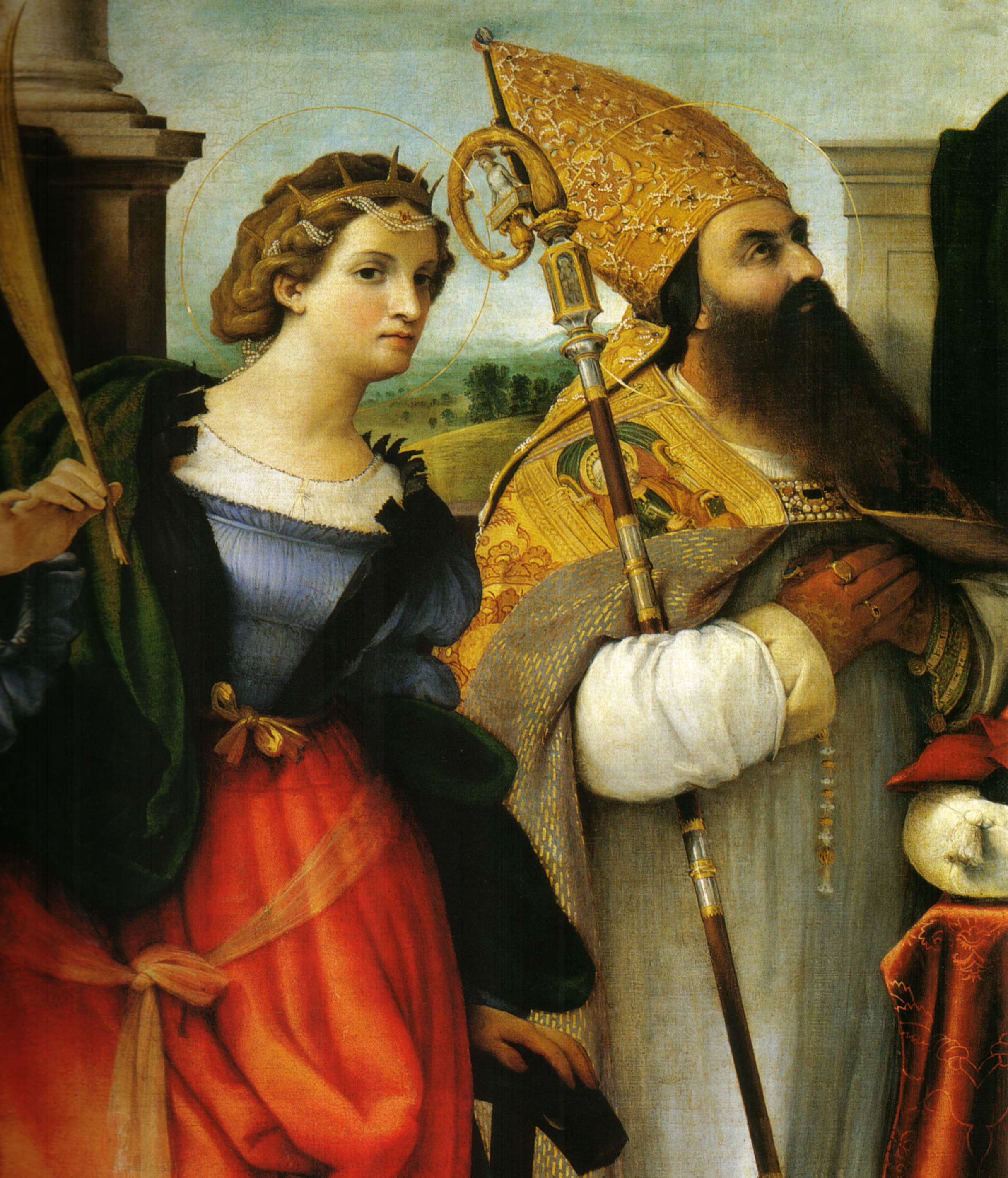 Katharina von Alexandrien and Augustinus von Hippo